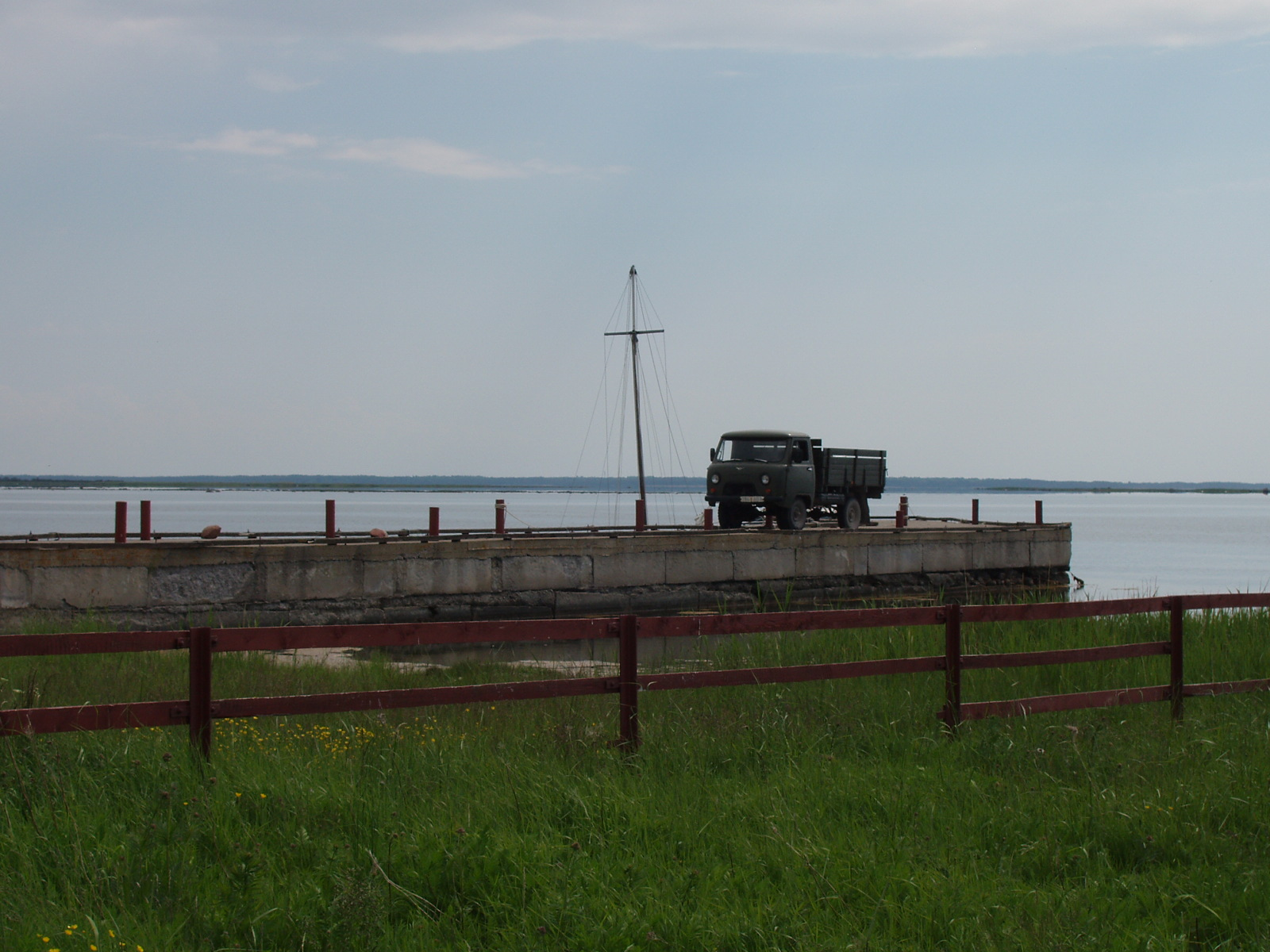 Vilsandi sadam